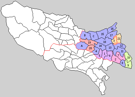 北多摩郡の町村。